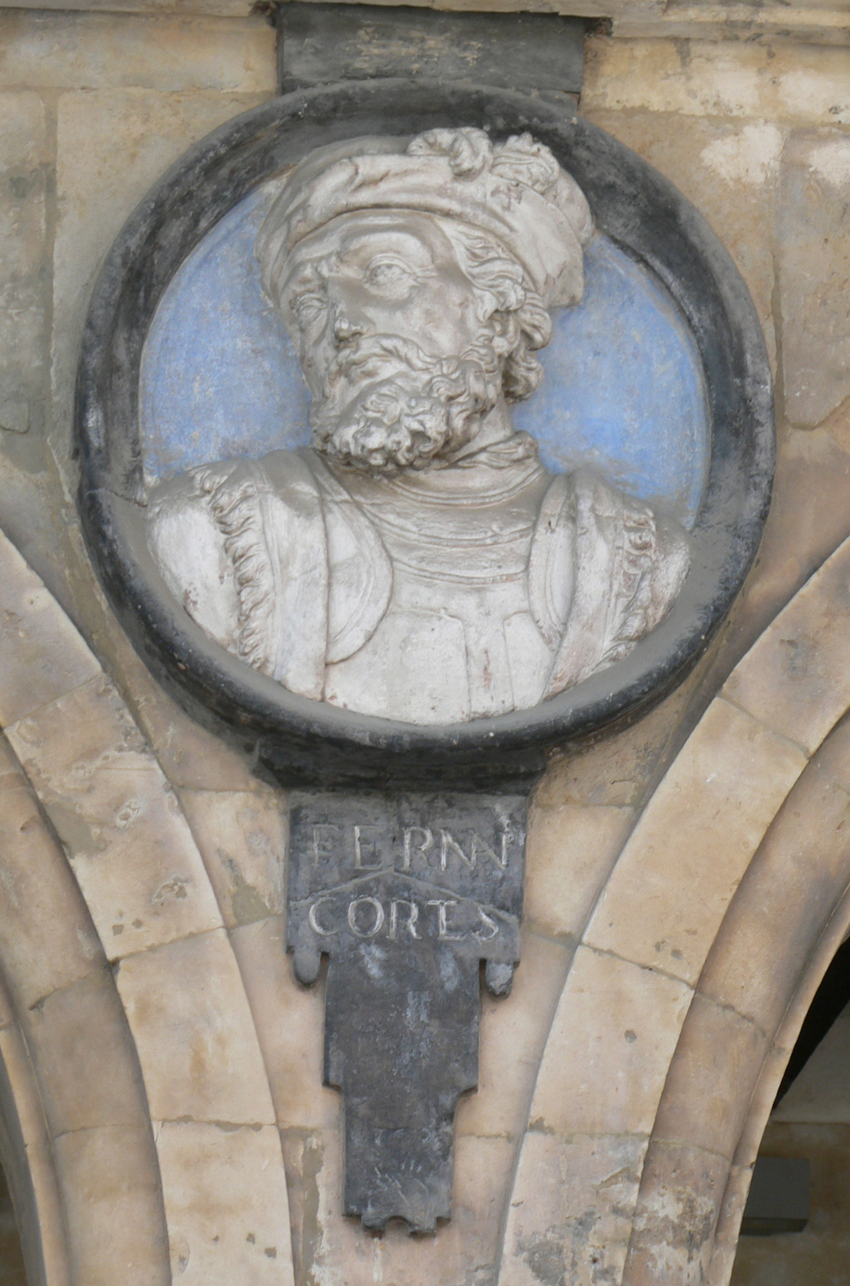 Medallón con la efigie de Hernán Cortés, conquistador español, Pabellón de San Martín, Plaza Mayor de Salamanca (España).